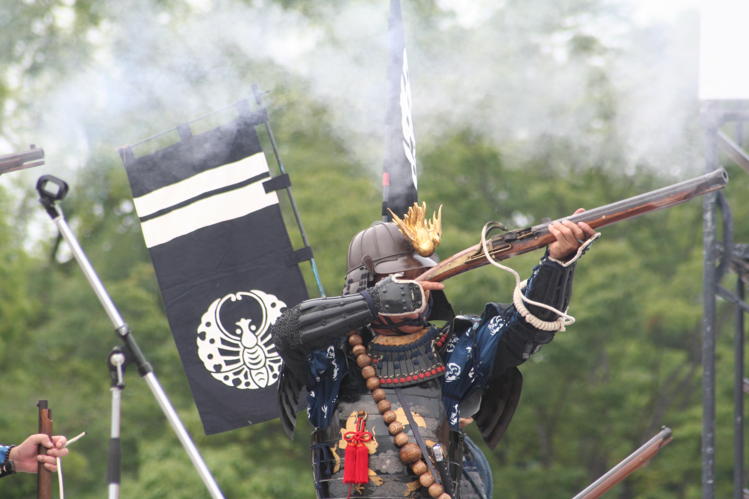 姫路お城祭。兵庫県姫路市にて毎年7月末から8月2日の3日間に渡り姫路城の南部大手前通りにて開催される祭である。第60回開催の2日目の祭の様子。